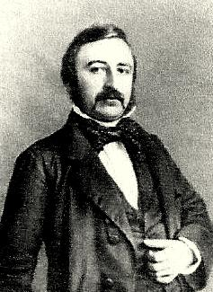 Porträt des Architekten und Baumeisters Robert Ferdinand Cremer